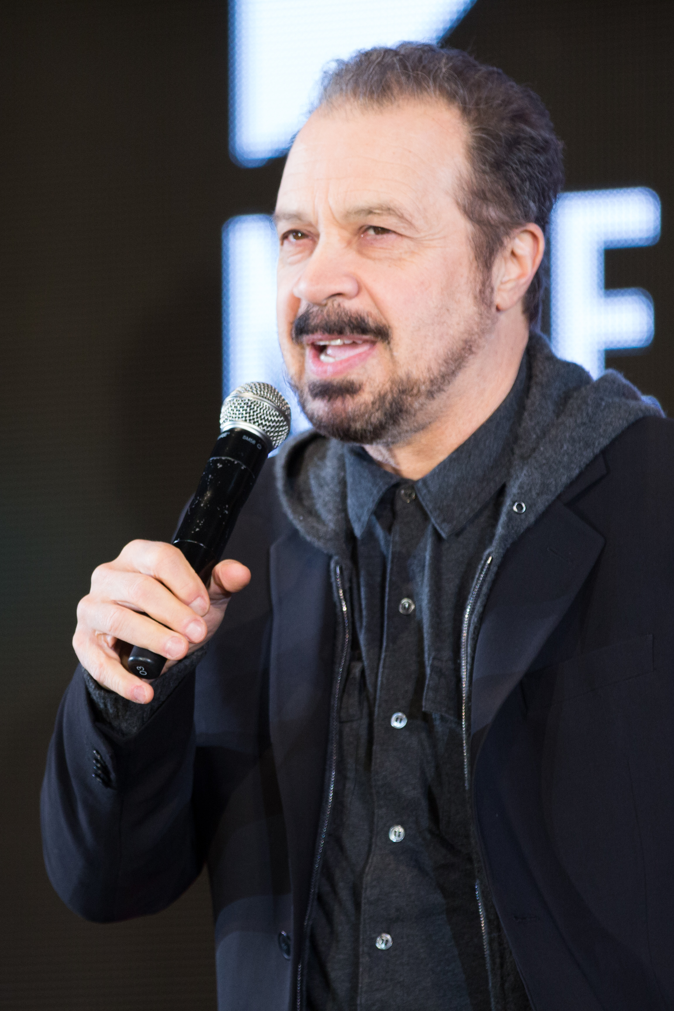 ジャック・リーチャー NEVER GO BACK ジャパン・プレミア レッドカーペット エドワード・ズウィック